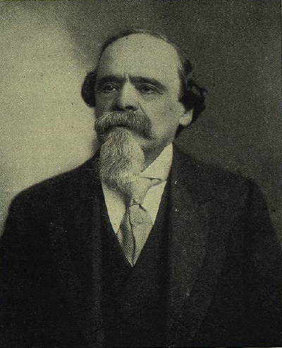 Ignacio Mariscal, fotografía de 1903.